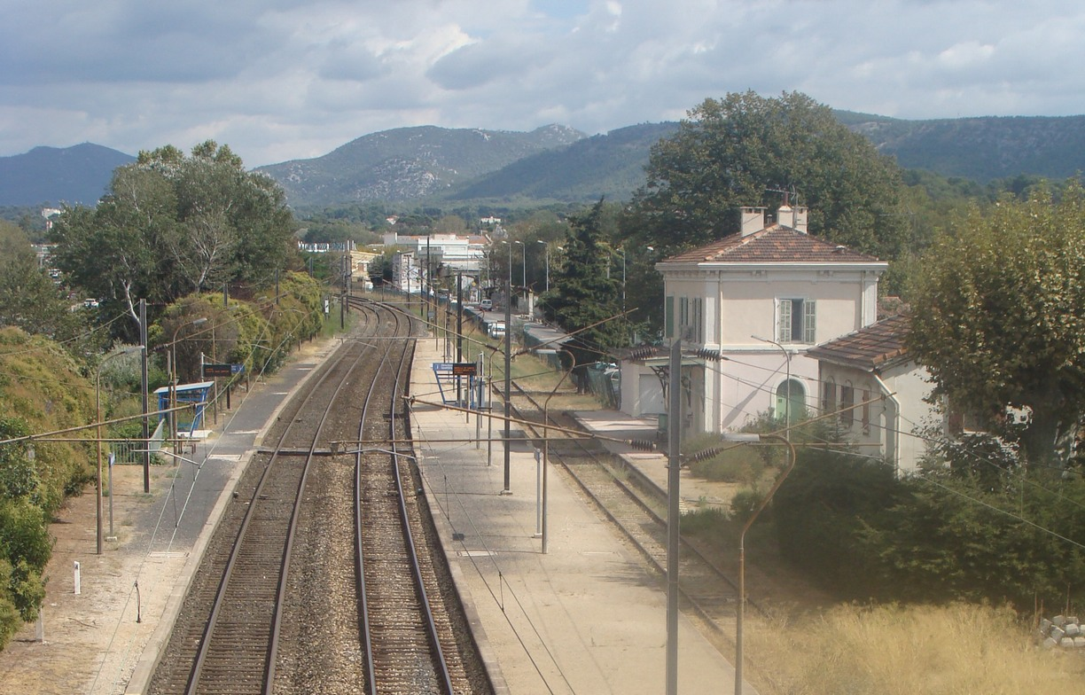 La gare de La Penne-sur-Huveaune (Bouches-du-Rhône), vue d'ensemble